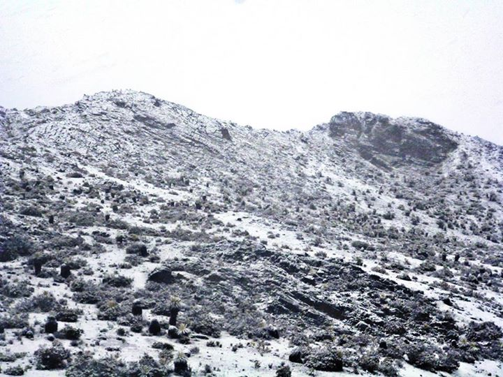 Vista parcial del páramo nevado en el Parque Nacional Sierra La Culata (Edo. Mérida)